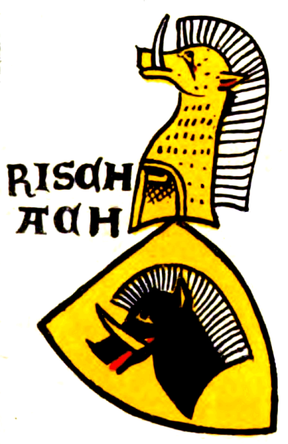 Wappen der Reischach (hier Rischach)